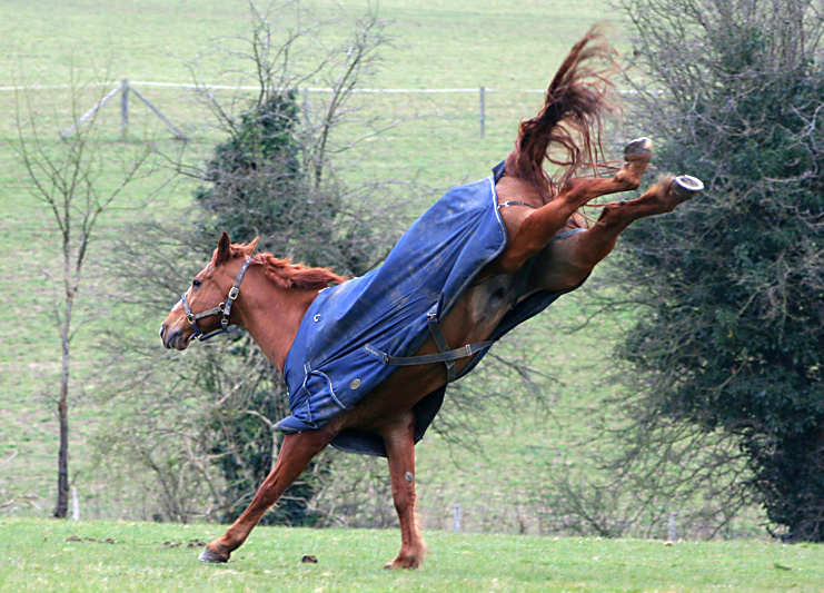 A flying kick!